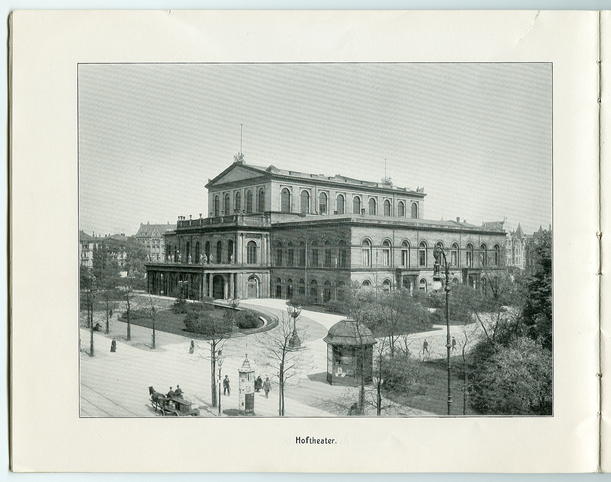 „Hannover – 26 Ansichten nach künstlerischen Aufnahmen“ von Karl F. Wunder. – Hoftheater.